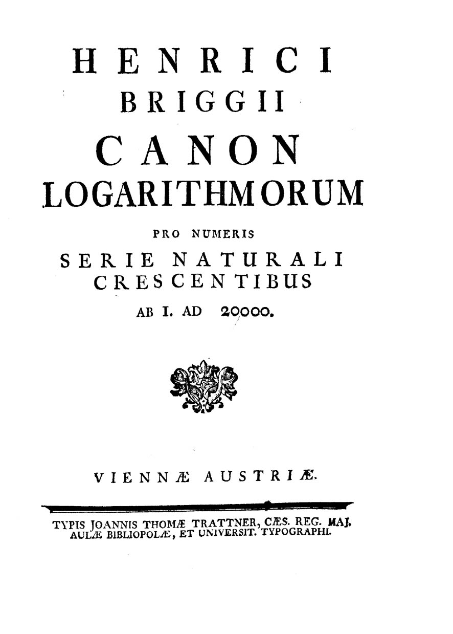 Henrici Briggii Canon logarithmorum pro numeris serie naturali crescentibus ab 1. ad 20000. - Viennae Austriae : typis Joannis Thomae Trattner, caes. reg. maj. aulae bibliopolae, et universit. typographi., [s.d.]. - [66] c. ; 4º .